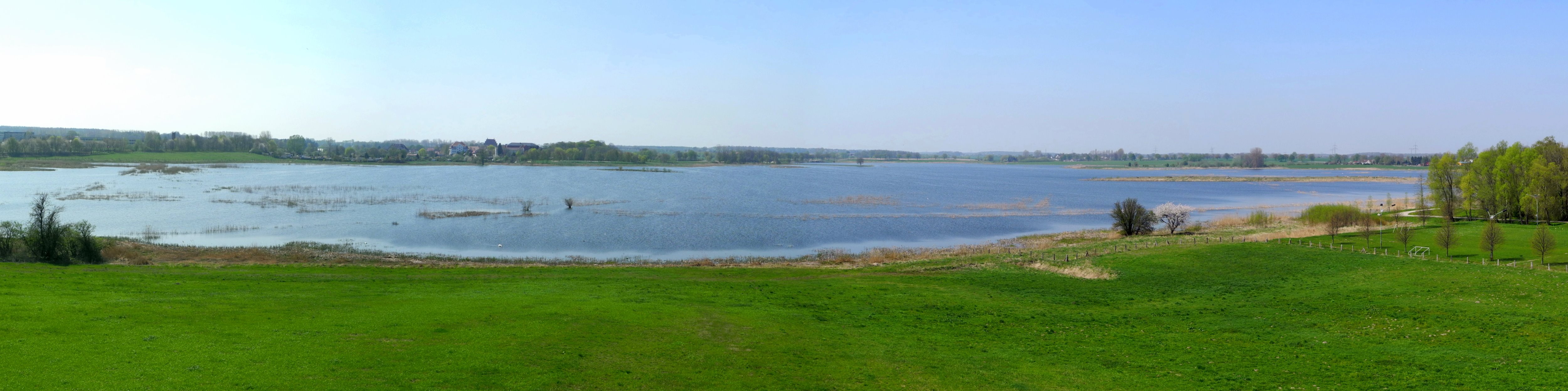 Richtenberger See - Lake of Richtenberg - Panoramablick aus dem Süd-Osten des Sees